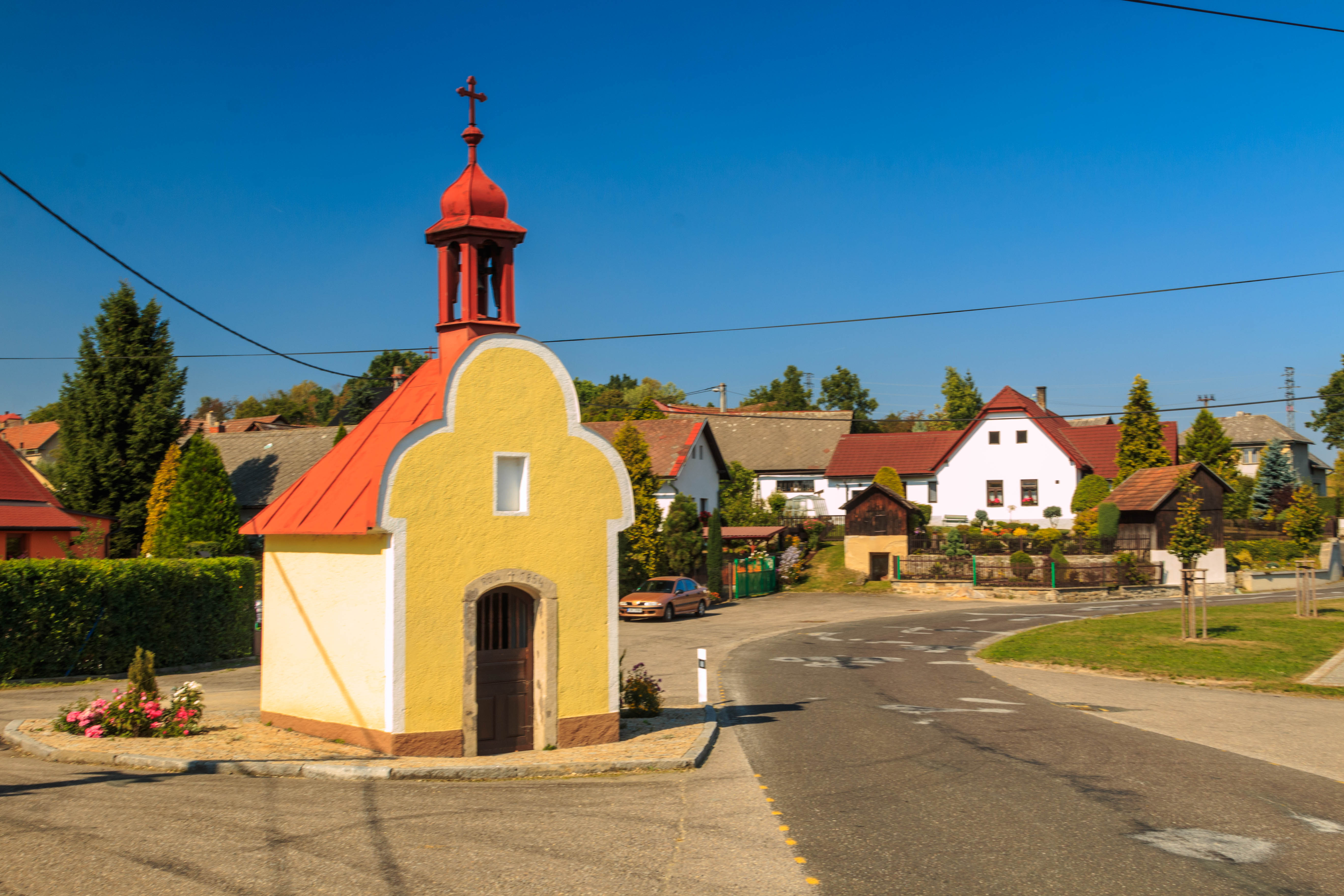 Meziklasí - kaple